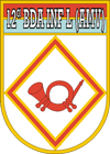 Brasão da 12ª Brigada de Infantaria Leve (Aeromóvel)